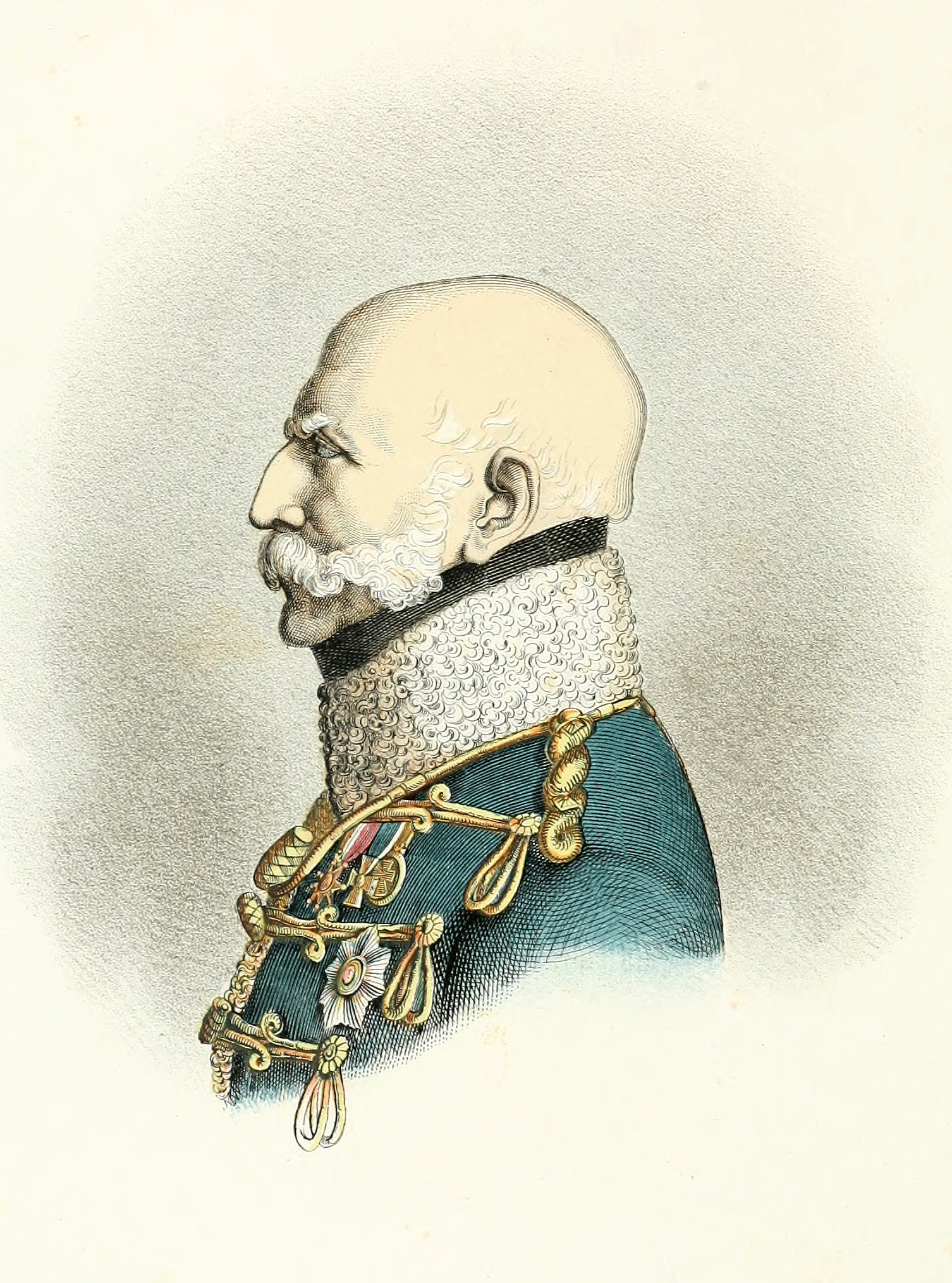 Seite aus dem Ernst August Album, laut dem Inhaltsverzeichnis betitelt „Portrait Sr. Majestät des hochseligen Königs Ernst August“ Darunter heißt es: „Sämtliche graphischen Arbeiten sind von Klindworth's Hof-Druckerei, das Portrait nach einer Oesterley'schen Zeichnung, ausgeführt“ ...